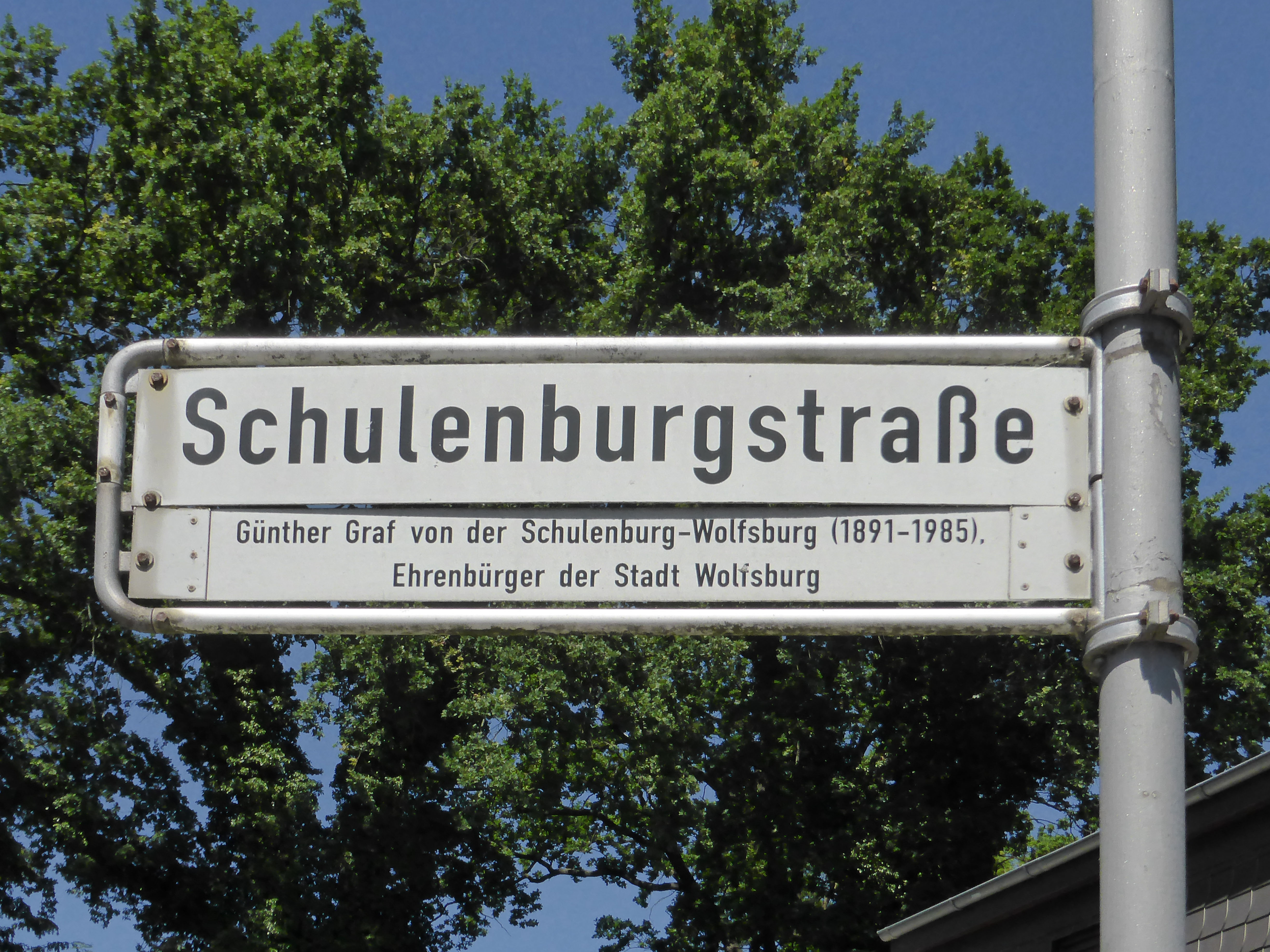 Straßenschild in Nordsteimke.